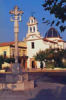 Basílica de Nuestra Señora del Lledó (Castellón de la Plana, España). Este santuario, rodeado de huertas de naranjos, fue construido entre 1724 y 1766 sobre otros más antíguos. Actualmente, está declarada Basílica Menor.